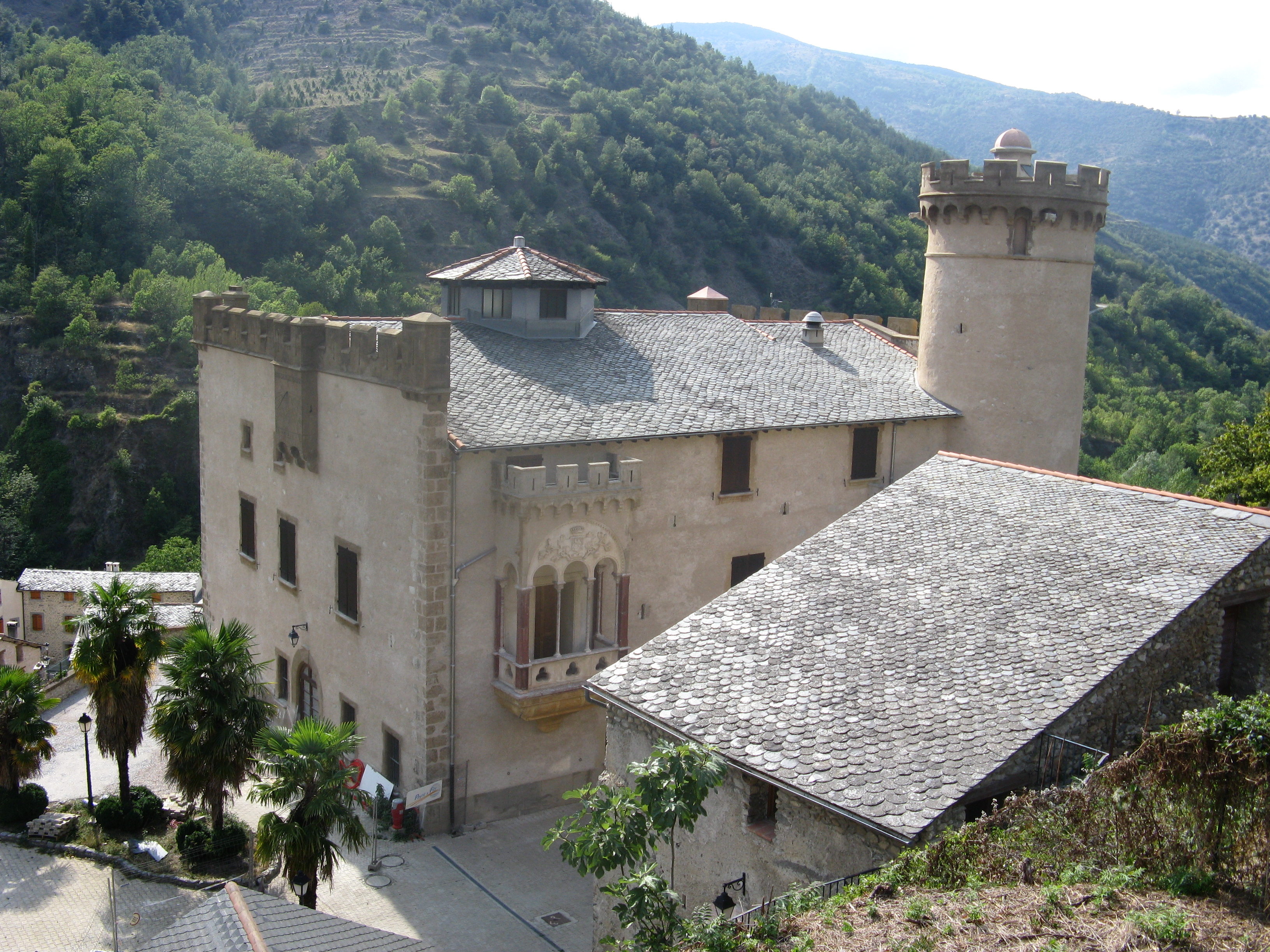 Château de Nyer,Pyrénées-Orientales - France